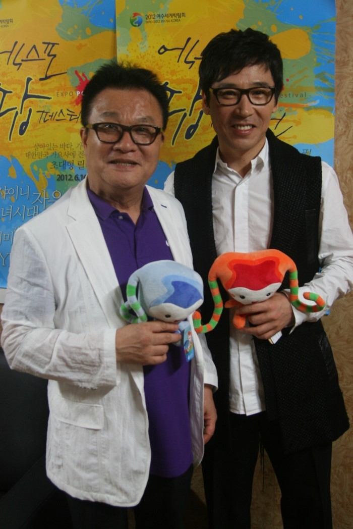 판소리 명창 조통달